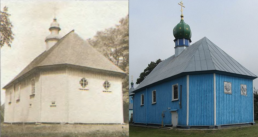 Беларуская (тарашкевіца): Маскалізацыя (русіфікацыя) Вялікага Княства Літоўскага. Вёска Войская Берасьцейскага павету. Царква Сьвятой Тройцы, помнік традыцыйнай беларускай драўлянай архітэктуры з элемэнтамі стылю барока: аўтэнтычны выгляд (налева) і па частковым руйнаваньні ў выніку маскоўскай перабудовы (направа)